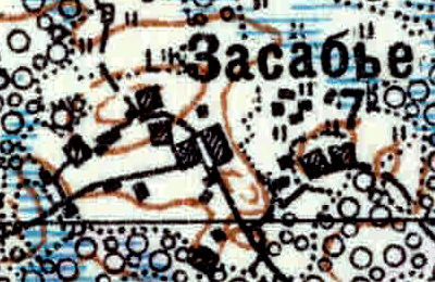 Топографическая карта Ленинградской области, квадрат VIc-27 (Залустижье), деревня Засобье